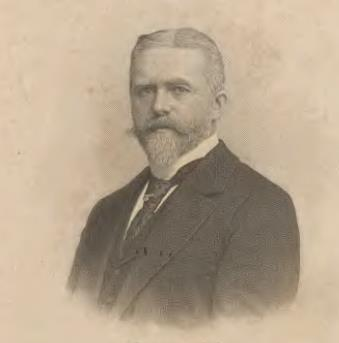 Helmuth von Maltzahn, German minister of Finance